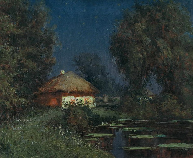 Картина «Ставок. Ніч», I чверть XX ст. Полотно, олія; 43,5х52,5; Різниченко Федір Петрович (1865-1922)